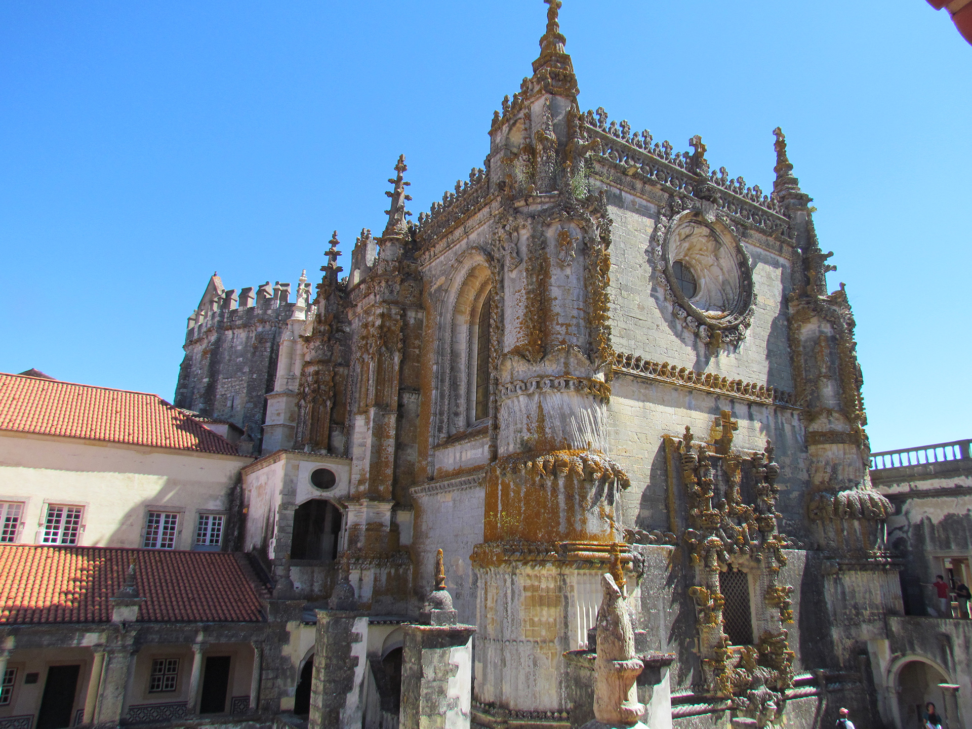 Castelo dos Templários - Tomar